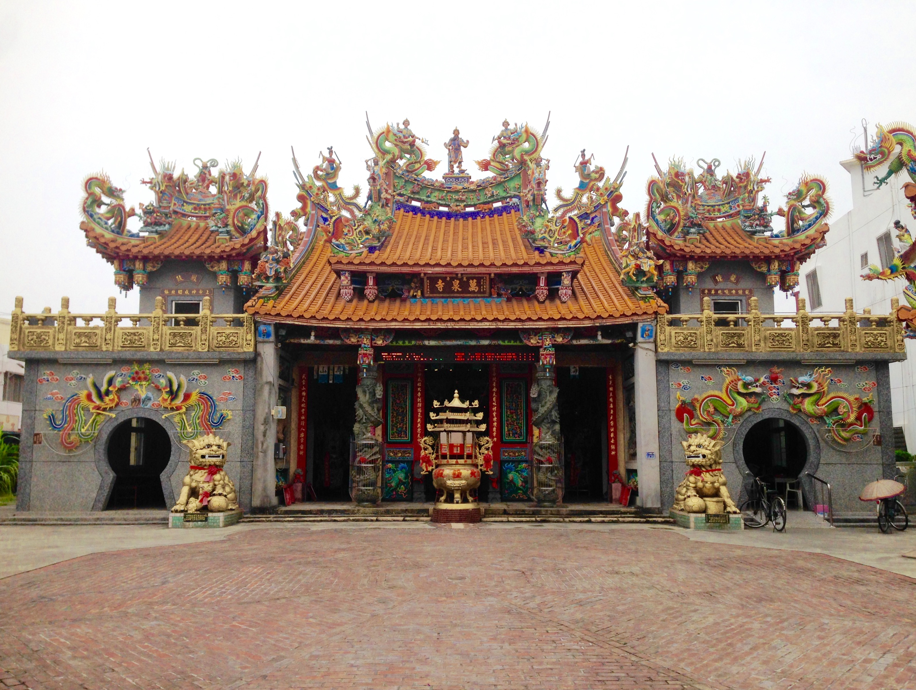 萬丹鄉萬泉寺